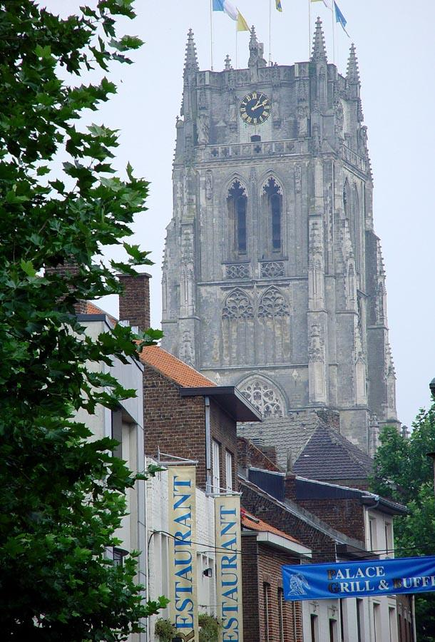 Beschreibung: Basilika in Tongeren Aufnahmedatum: 29. August 2002 Fotograf: ArtMechanic